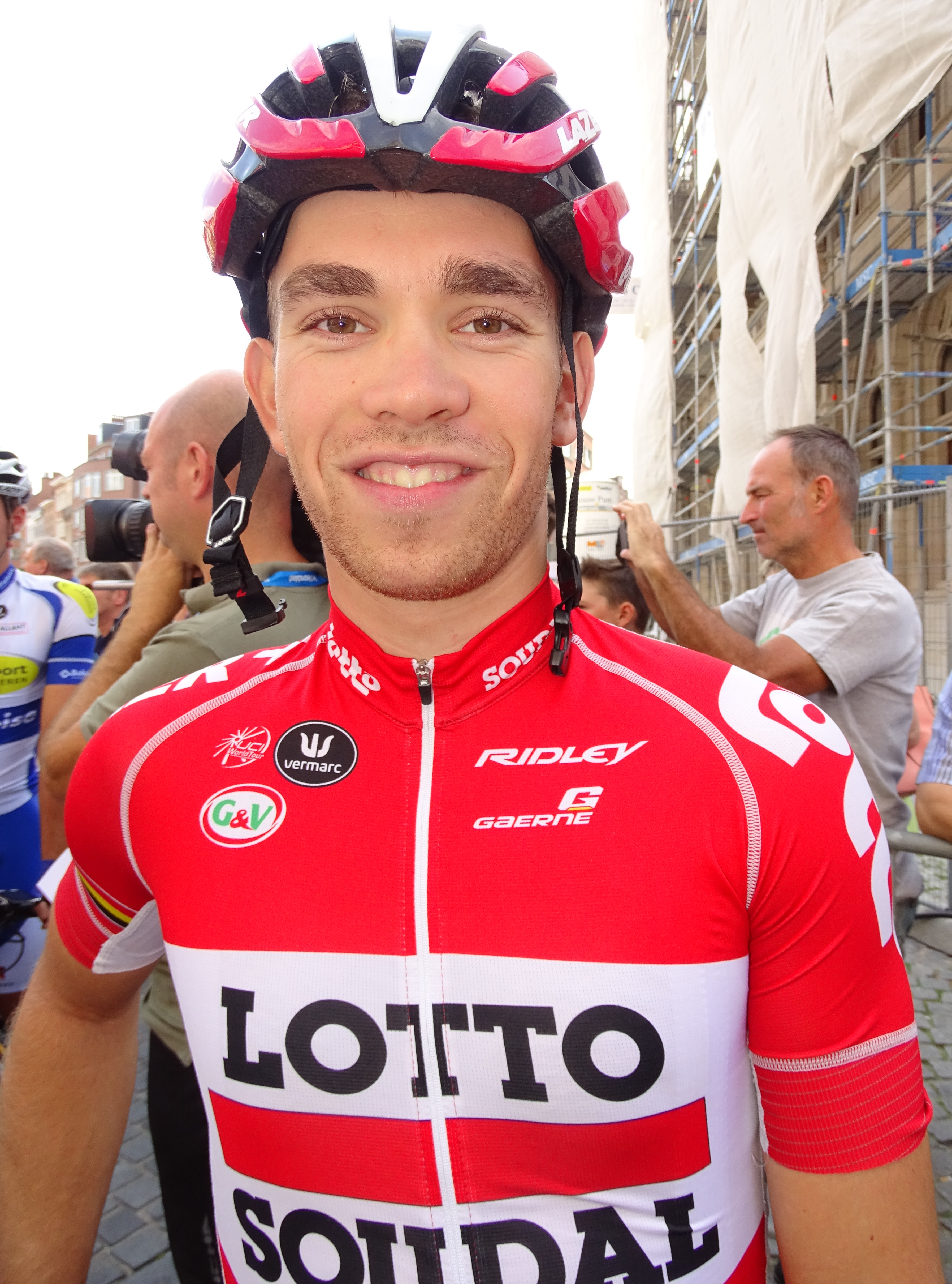 Reportage réalisé le dimanche 23 août à l'occasion du départ et de l'arrivée du Grand Prix Jef Scherens 2015 à Louvain, Belgique.